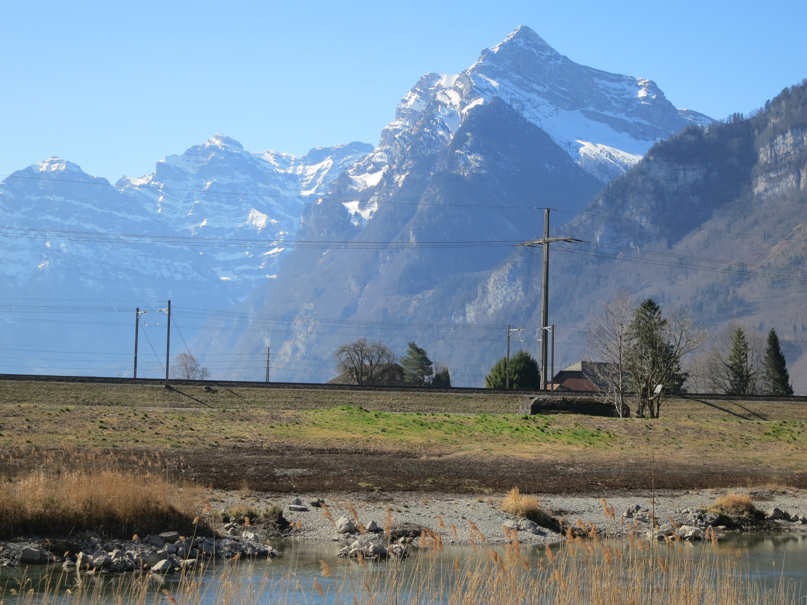 Infanteriebunker, Ziegelbrücke GL, Schweiz: Bunker Wärterhaus A 6808